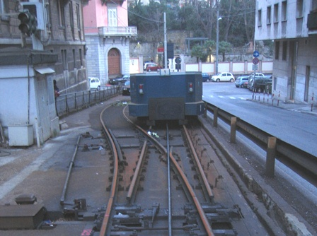 Dettaglio del sistema misto Trieste-Opicina